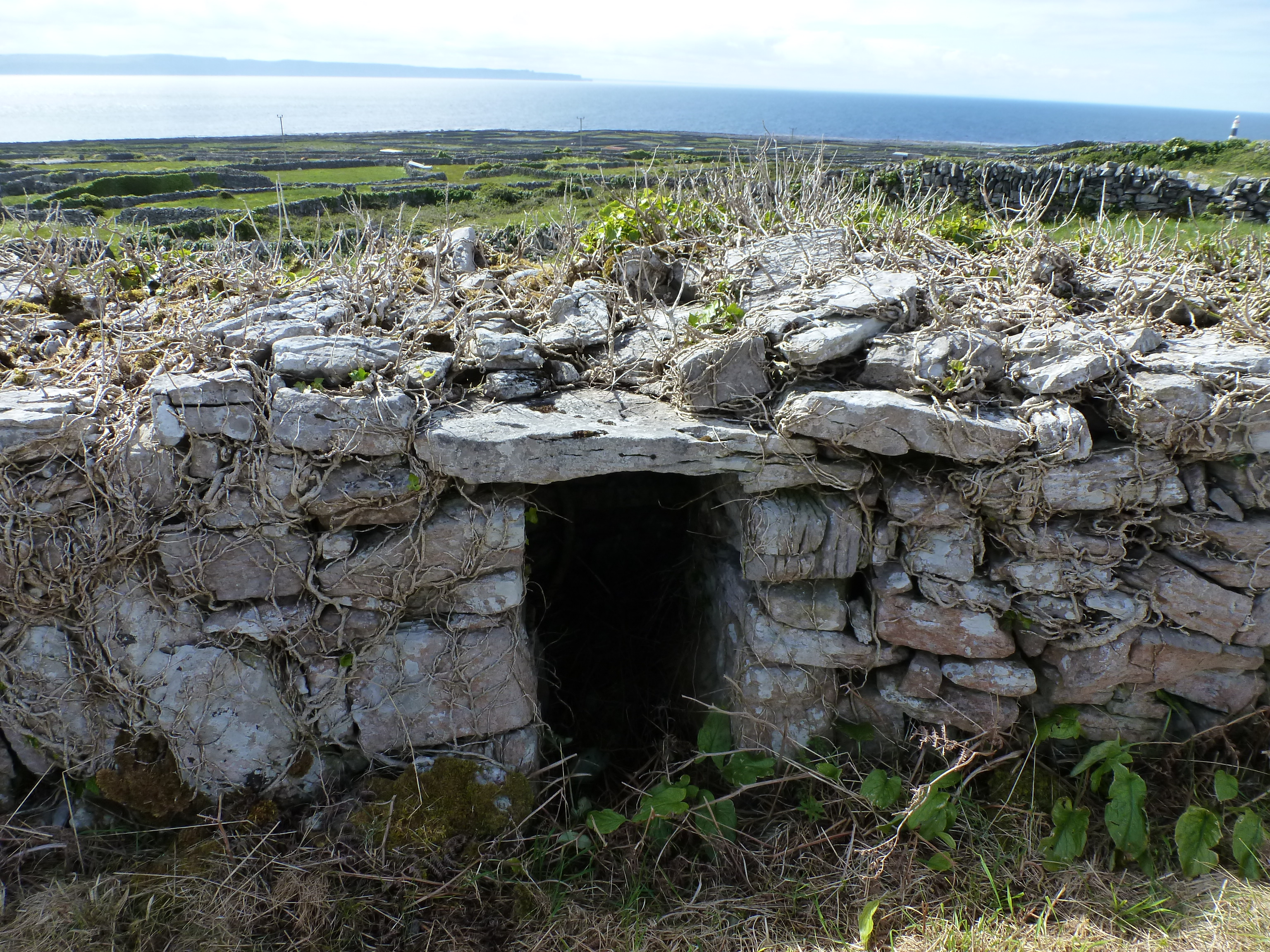 Cill na Seacht nInión - Inis Oírr